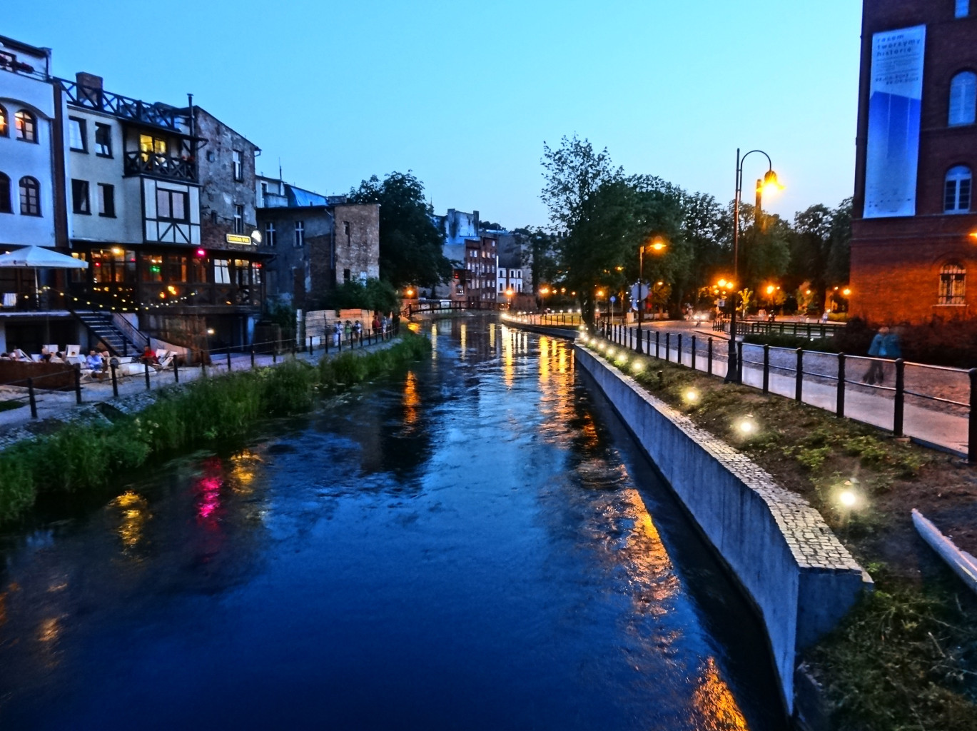 Wenecja Bydgoska – zespół architektoniczny Starego Miasta w Bydgoszczy zbudowany bezpośrednio nad rzeką Młynówką (zbud. 1870-1900).